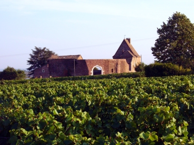 Vue du château de Leynes prise par Adrien Alioua